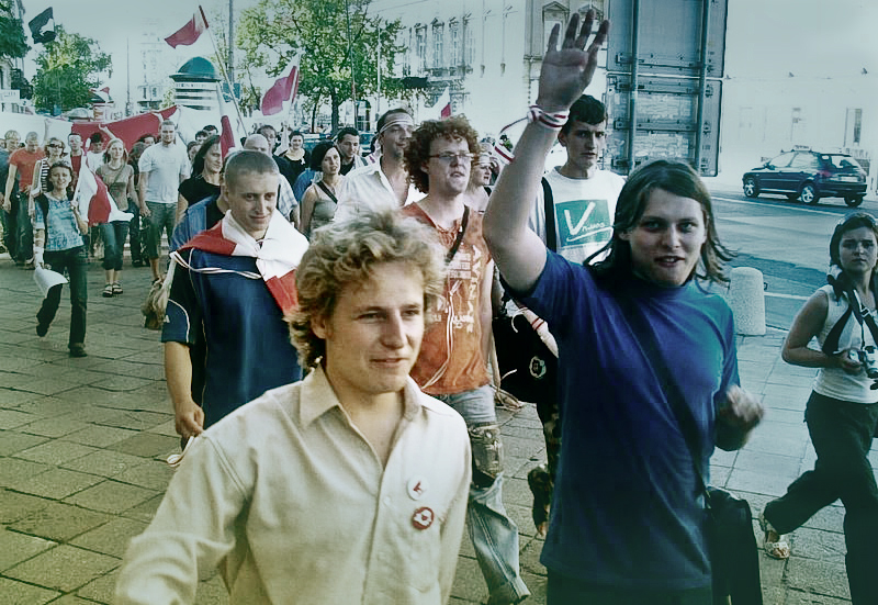 Stypendyści Programu Stypendialnego im. Konstantego Kalinowskiego na pochodzie w Warszawie latem 2006 roku. Na pierwszym planie z lewej Kanstancin Żylinski, zmarły w niejasnych okolicznościach w maju 2010 student Uniwersytetu Gdańskiego.